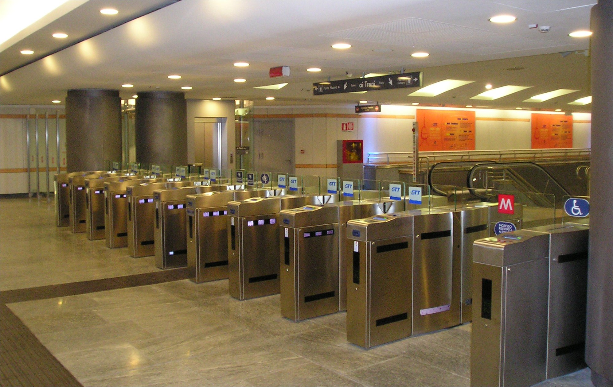 Tornelli di ingresso in una stazione della metropolitana di Torino.